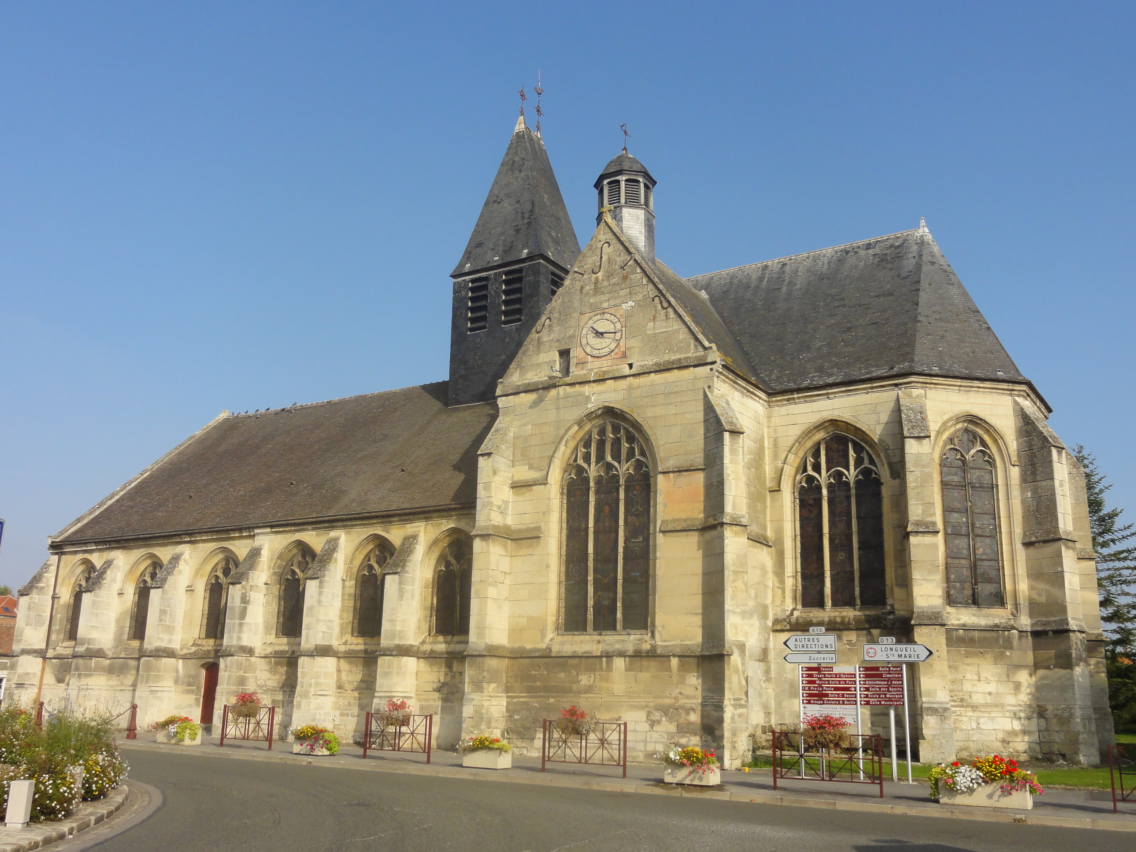 La façade sud sur la place Saint-Georges au centre du village.